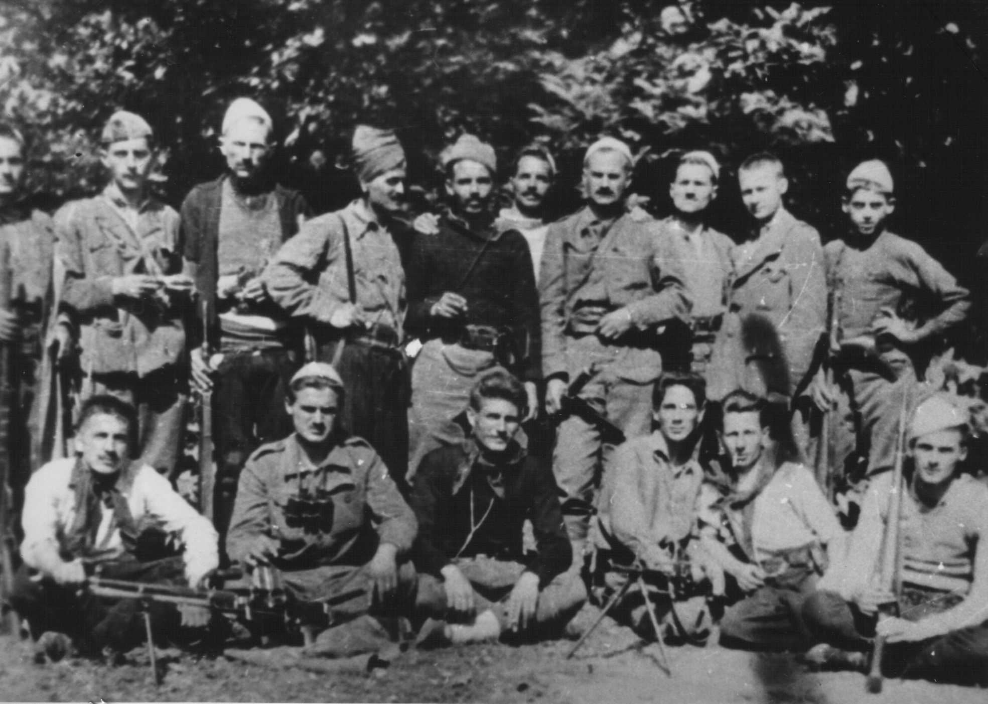 Srpskohrvatski / српскохрватски: Fadil Hodža sa partizanima u Malesiji, severna Albanija.